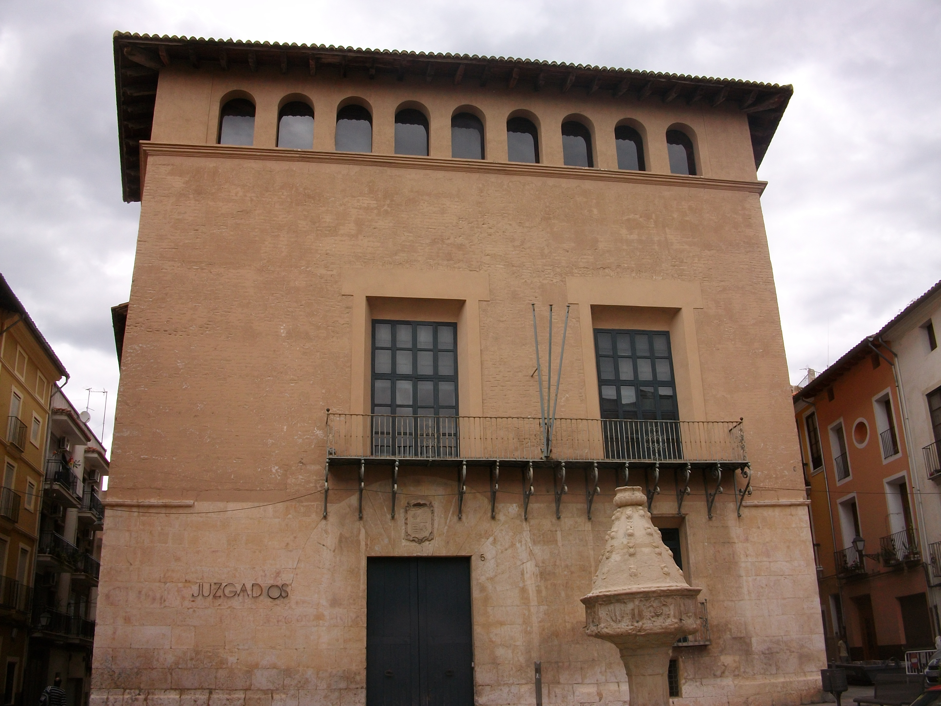 Palau d'Alarcón, segle XVIII.